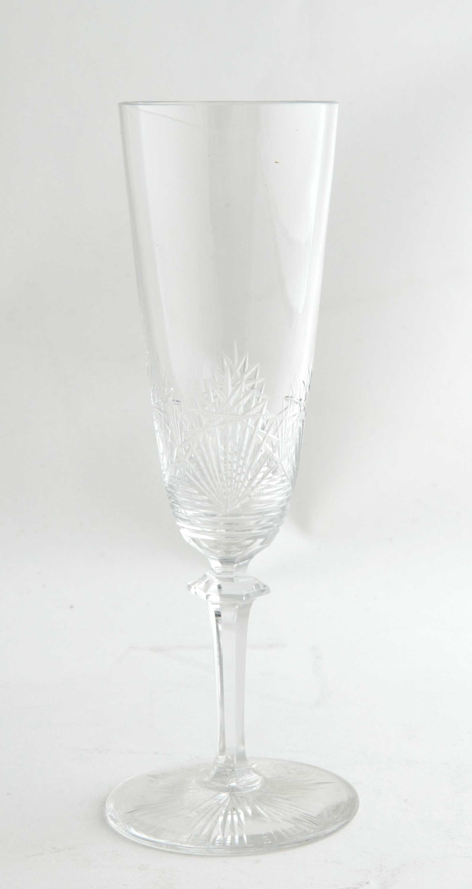 Champagneglass med smal klokke, høyde 17 cm. Norsk Folkemuseum NF.1971-0763.